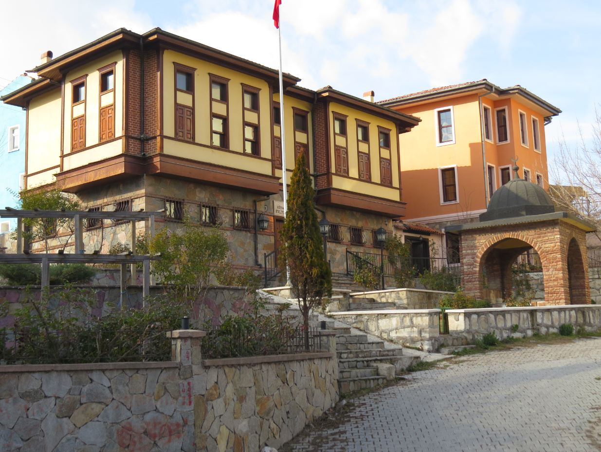 Evliya Çelebi'nin Evi Müzesi, Kütahya